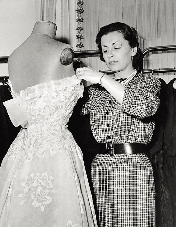 Irene Galitzine, Rome